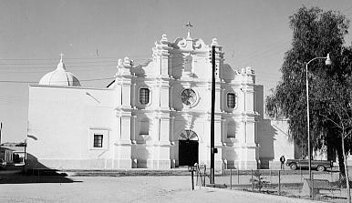 Mission San Miguel Arcángel de Oposura in the Sonoran Desert — in present day Moctezuma, Sonora (state), México. Built over 1724 to 1738.